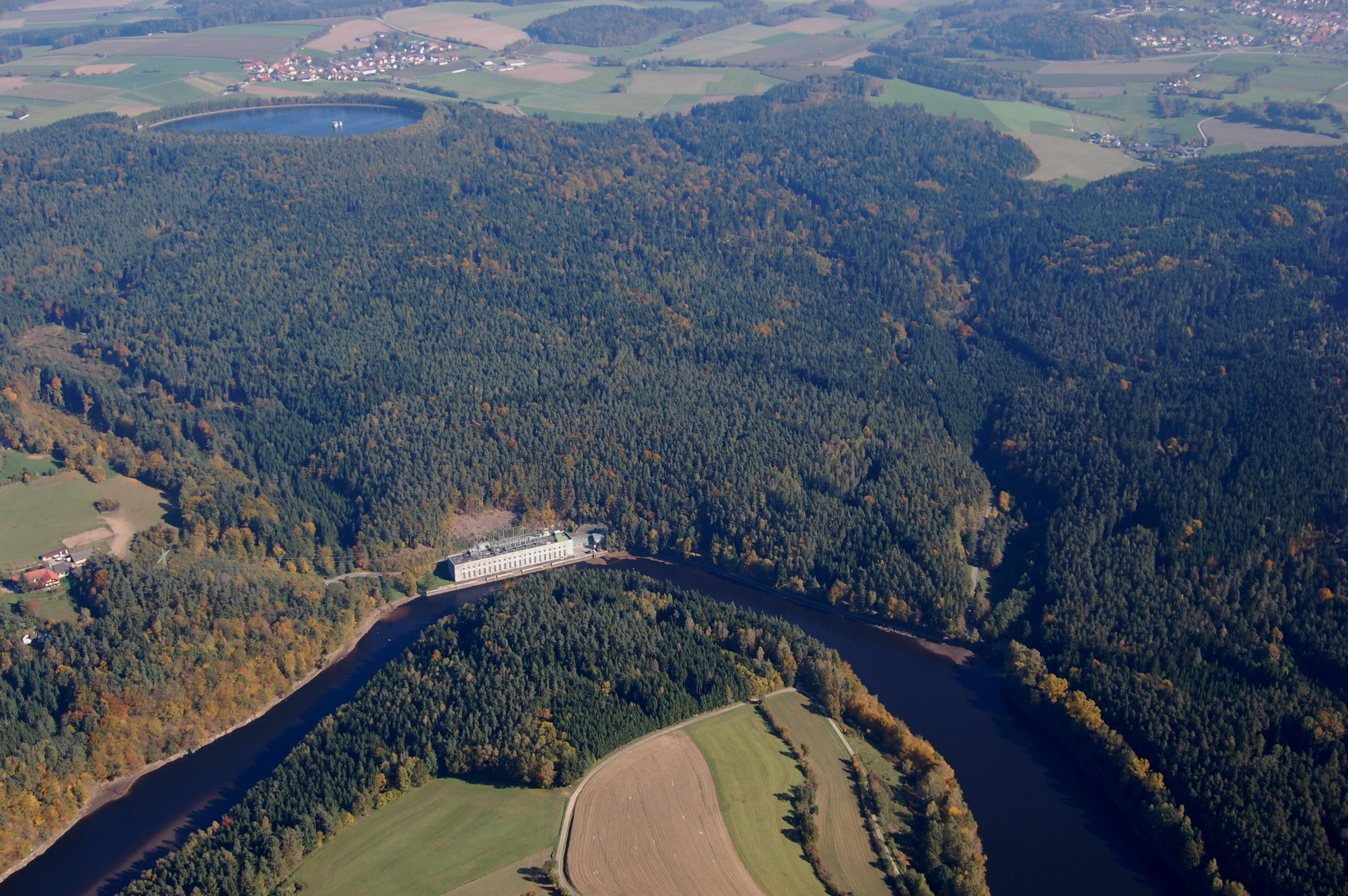 Fluss Pfreimd (Stausee Trausnitz) mit Kraftwerk Reisach bei Trausnitz, Hochspeicher Rabenleite bei Großenschwand